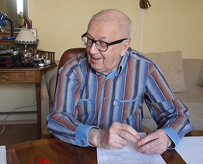 Фото Анатолия Васильевича Дмитриева.